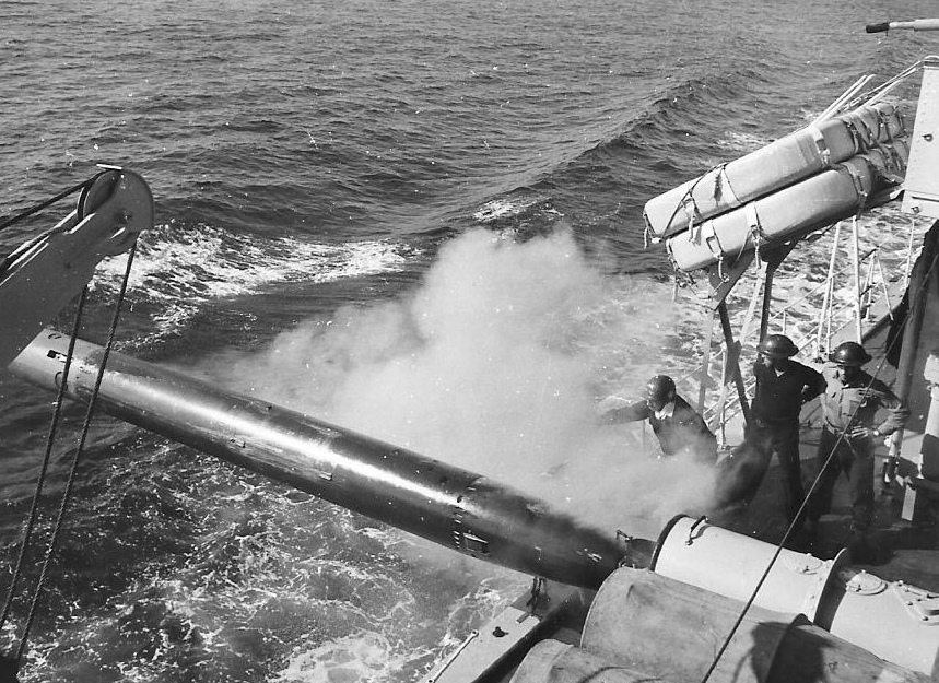 מוצבי תפעול ונשק המשחתת אח"י יפו ק-42